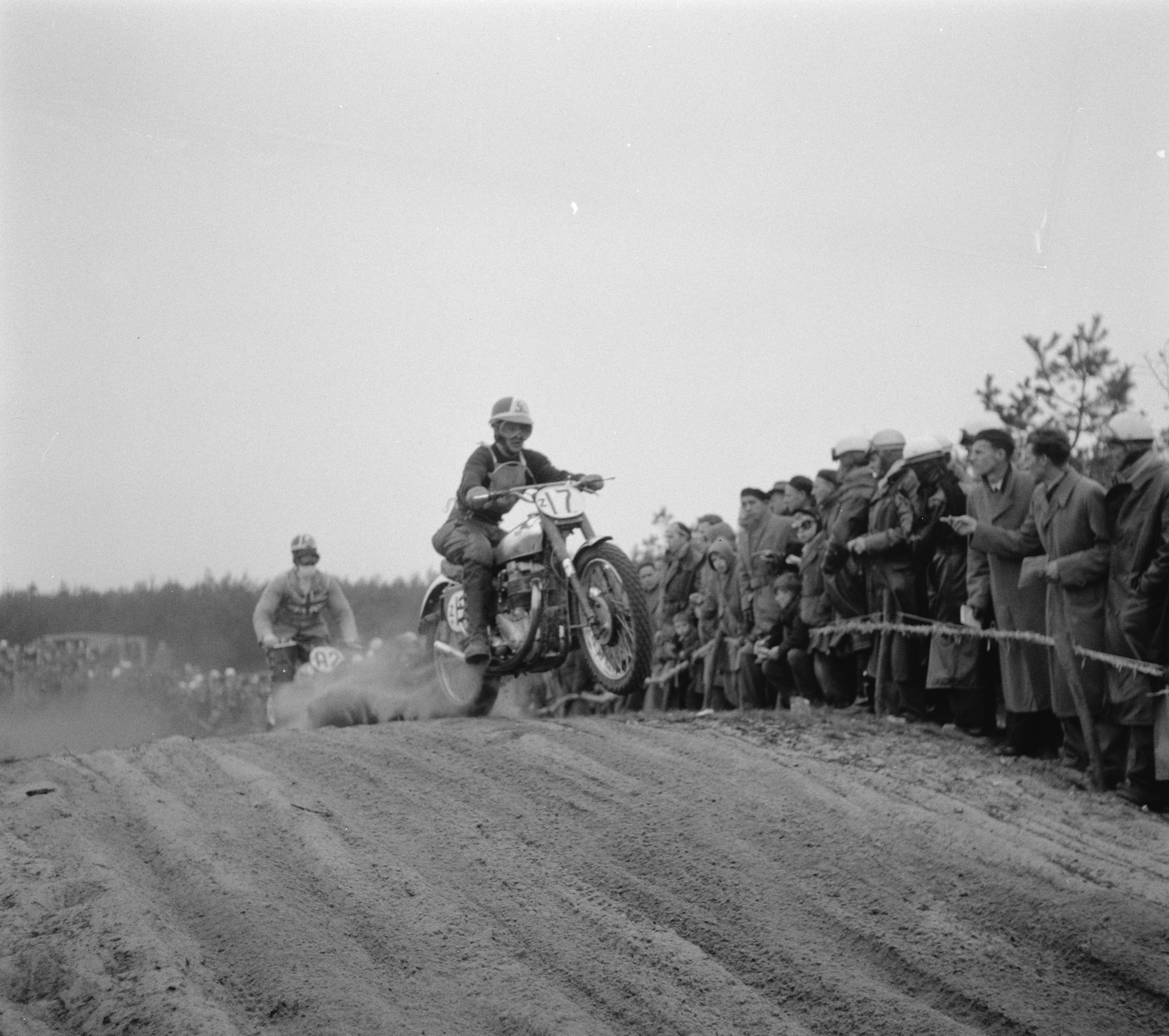 Collectie / Archief : Fotocollectie Anefo Reportage / Serie : [ onbekend ] Beschrijving : Internationale Motor- en terreinwedstrijden te Boekel. Tweede S. Lundin (Zweden) op BSA Datum : 2 april 1956 Locatie : Boekel Trefwoorden : Motoren, terreinwedstrijden Persoonsnaam : S. Lundin Fotograaf : Behrens, Herbert / Anefo Auteursrechthebbende : Nationaal Archief Materiaalsoort : Negatief (zwart/wit) Nummer archiefinventaris : bekijk toegang 2.24.01.03 Bestanddeelnummer : 907-6723